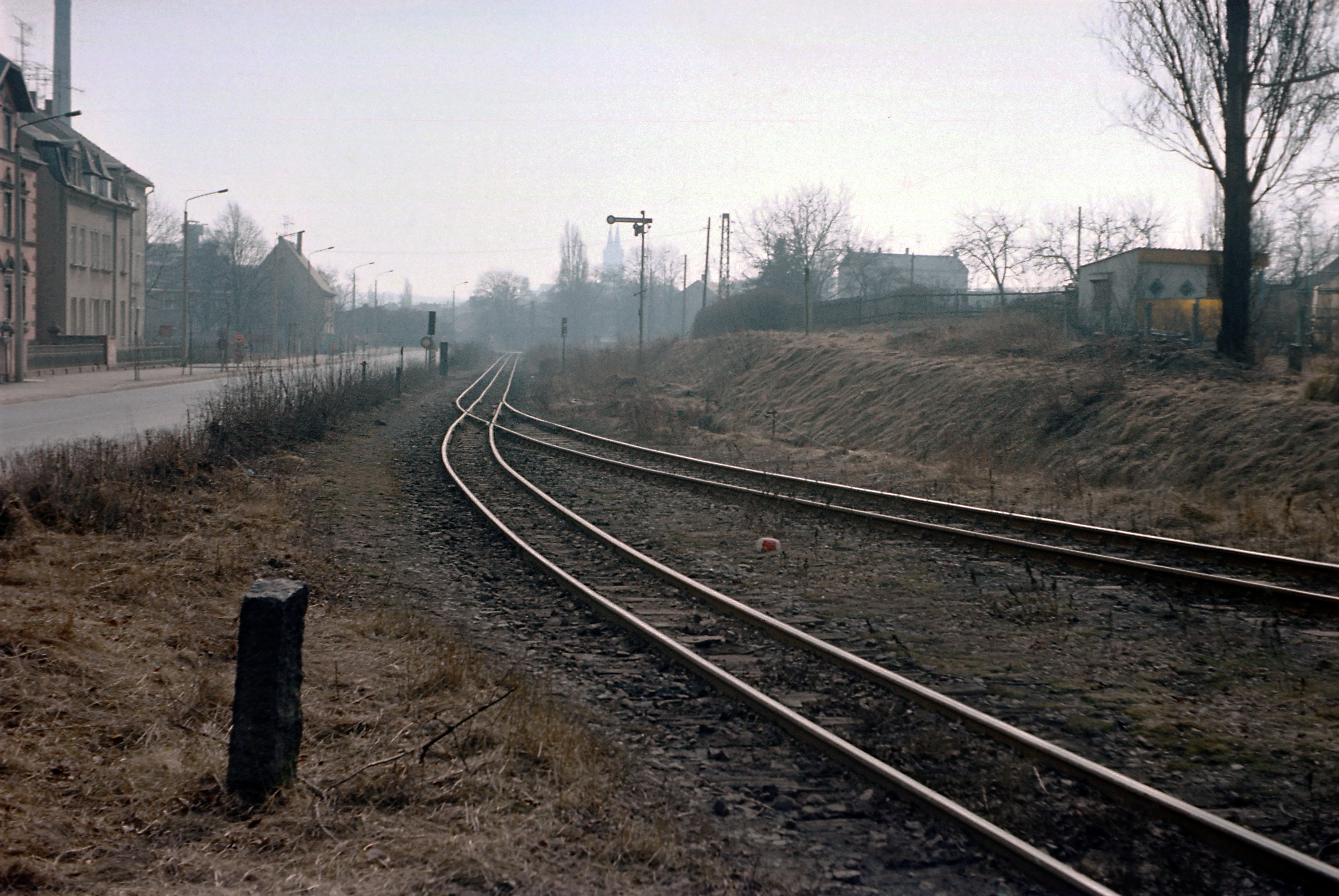 Dreischienengleis Richtung Anschl Zuckerfabrik (Streckengleis Oschatz–Mügeln)